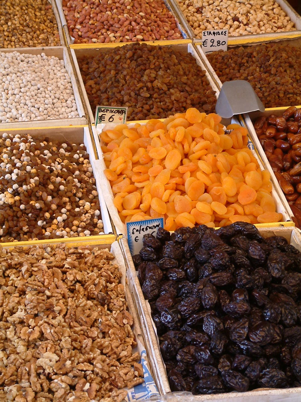 dry fruits, fruits séchés